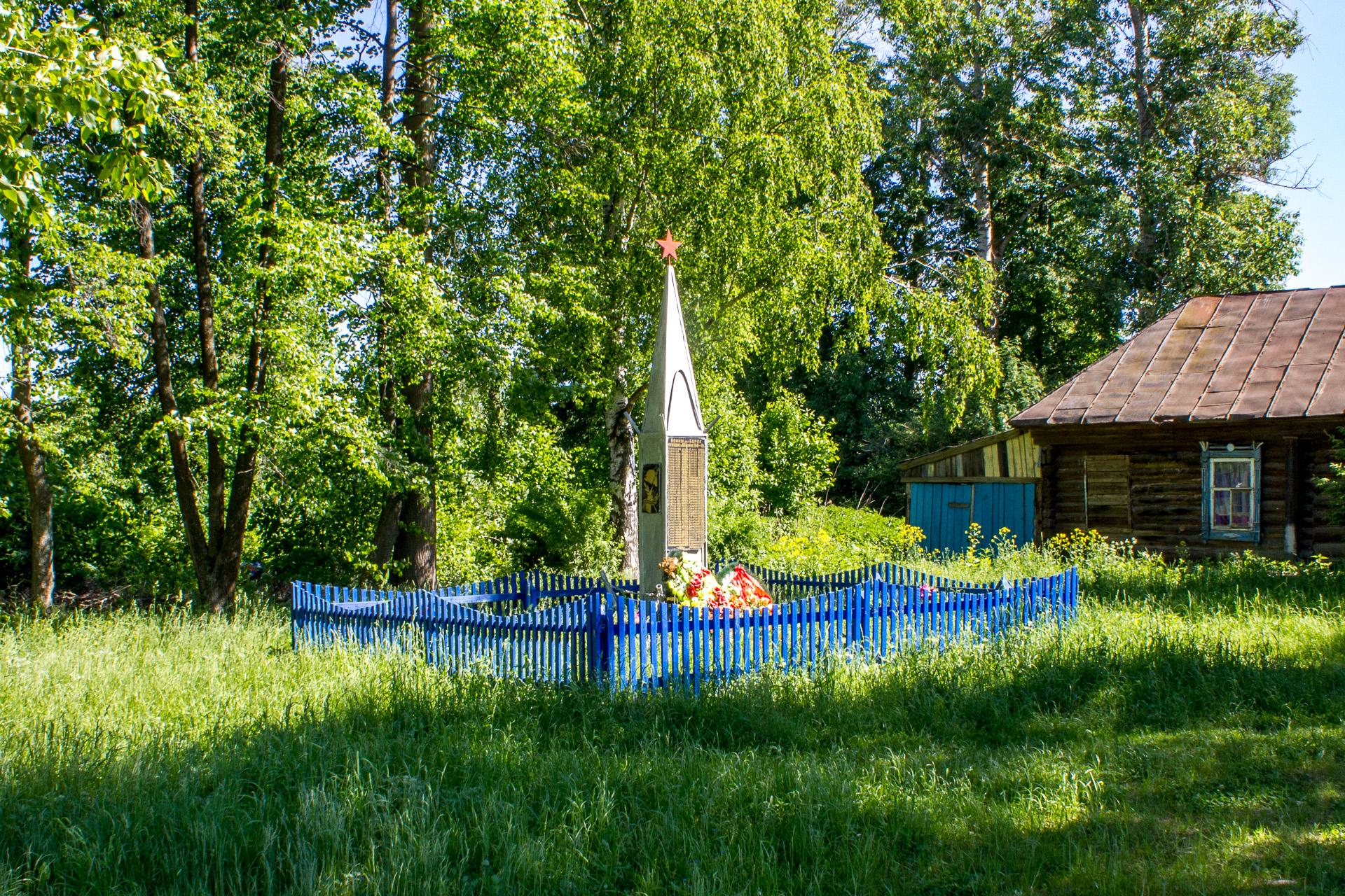 Памятник